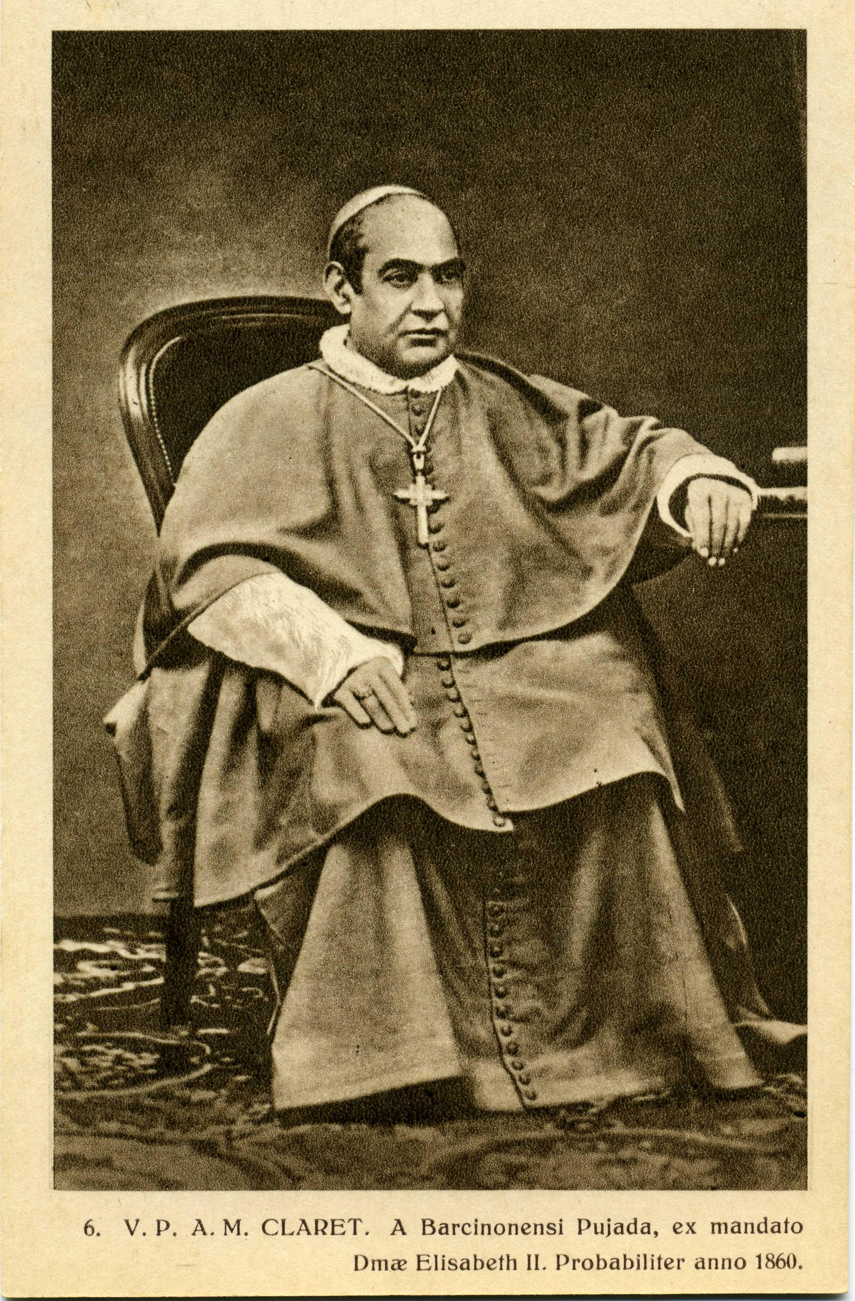 Fotografiado por Pujadas. Barcelona, 1860.